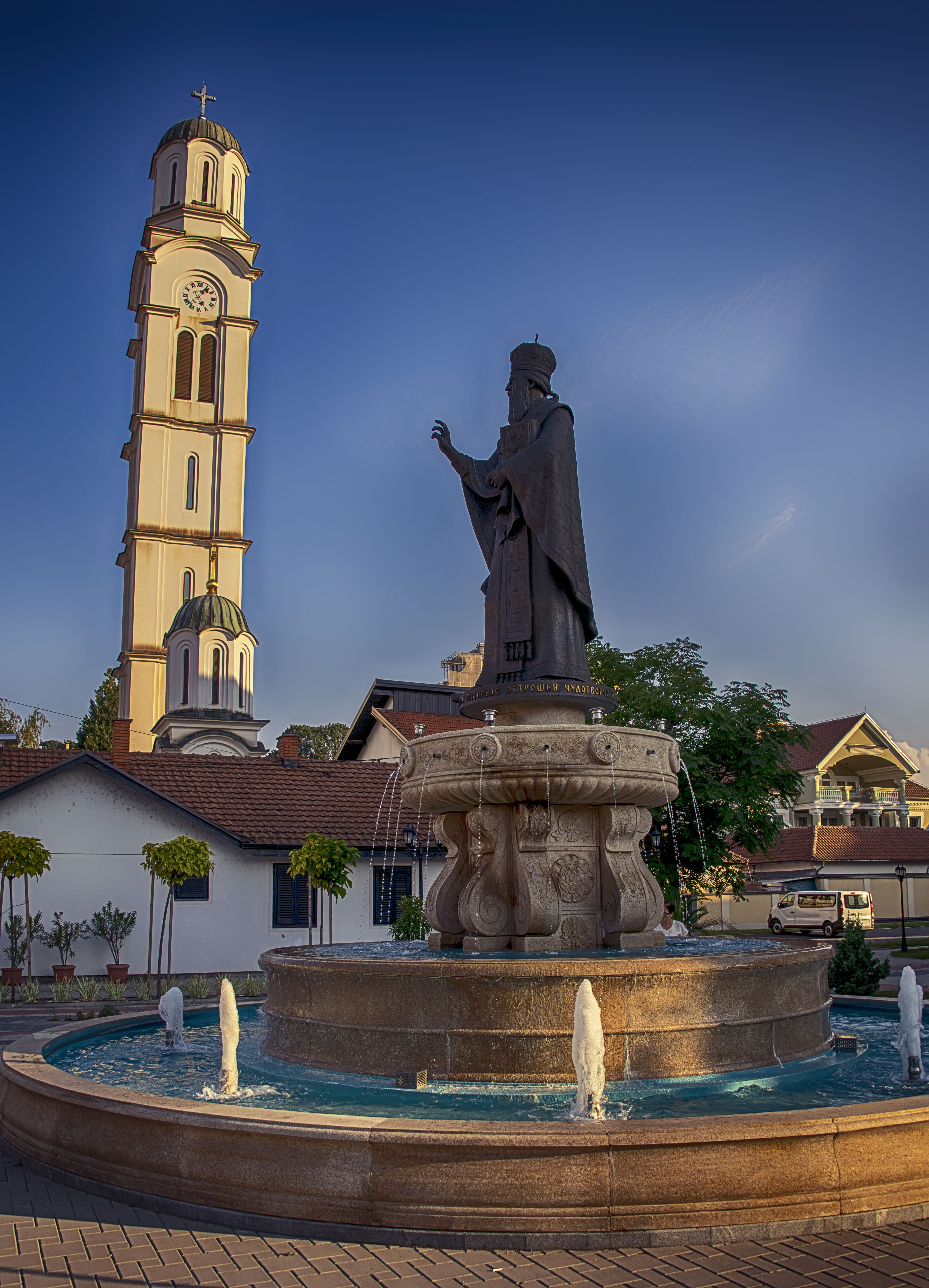 Manastir Sv. Vasilije Ostroškog, Bijeljina, This image was uploaded as part of Trace of Soul 2018.